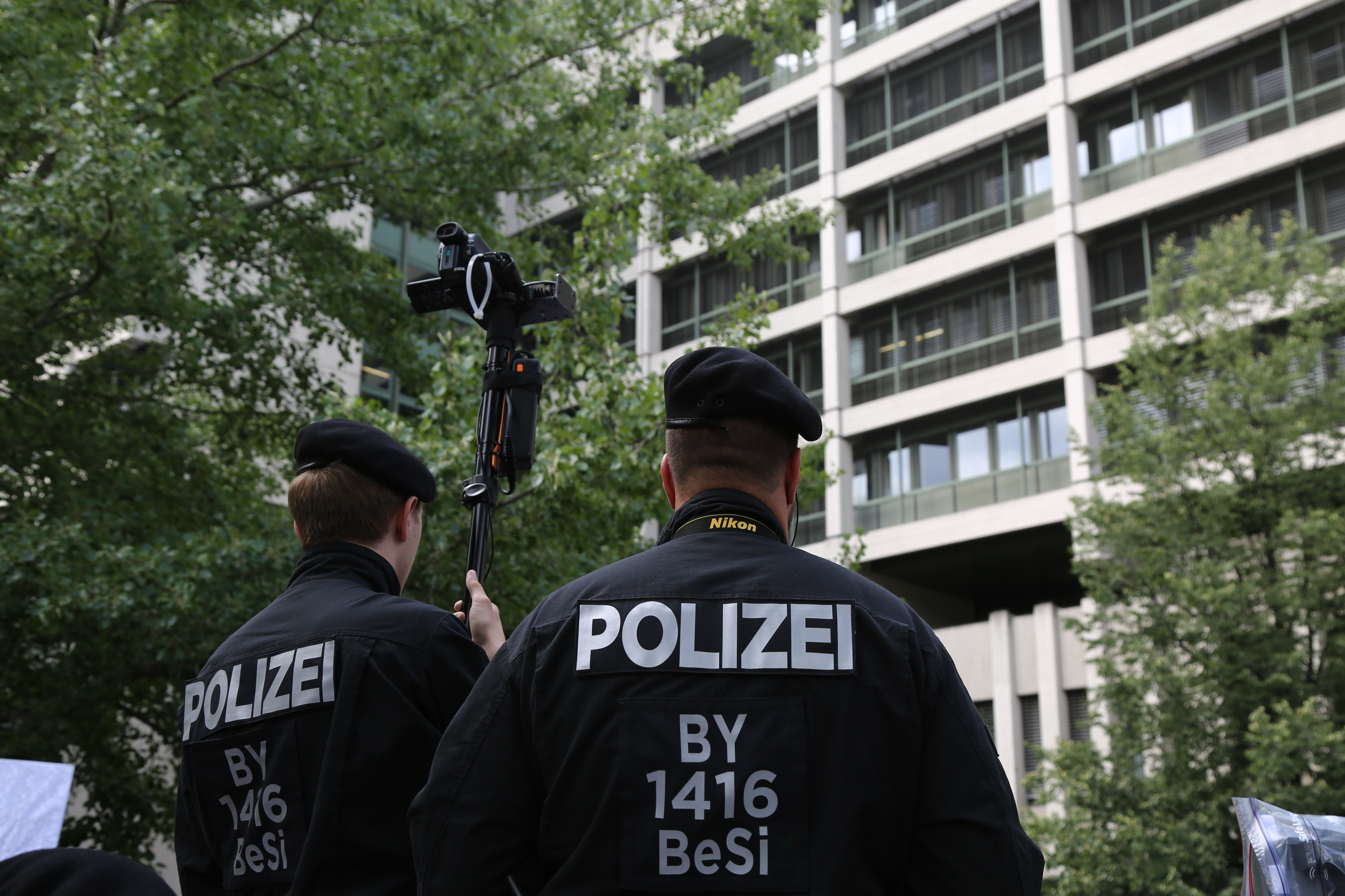 "Kein Schlussstrich" - Demonstration zur Urteilsverkündung im NSU-Prozess am 11. Juli 2018 in München